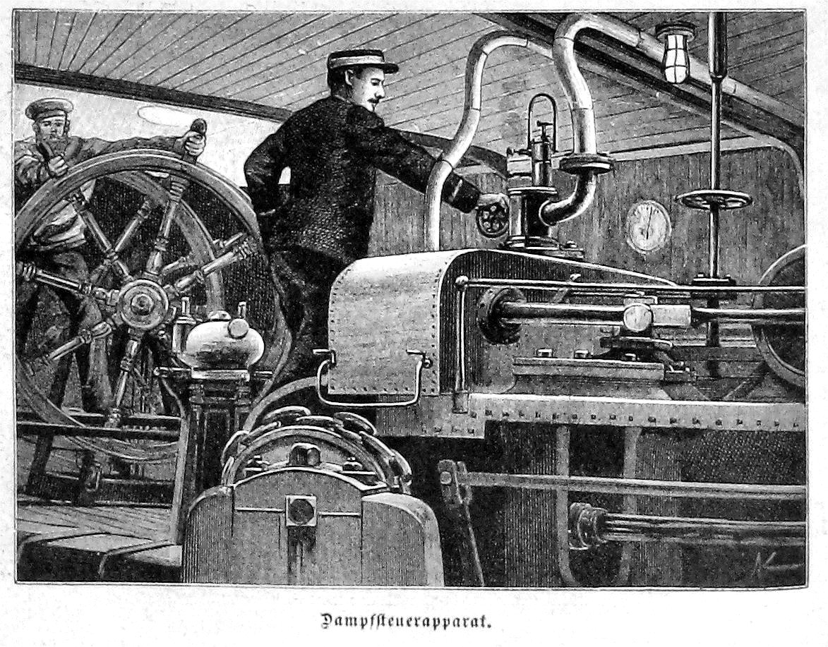 Dampfsteuerapparat des Schnelldampfer Columbia